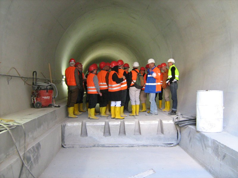 Masse-Feder-System am U-Bahnhof Kaulbachplatz der Nürnberger Linie U3 im Bauzustand. Die Gleistragplatte dient als Masse, die durch Elastomerplatten federnd auf dem Untergrund gelagert ist.